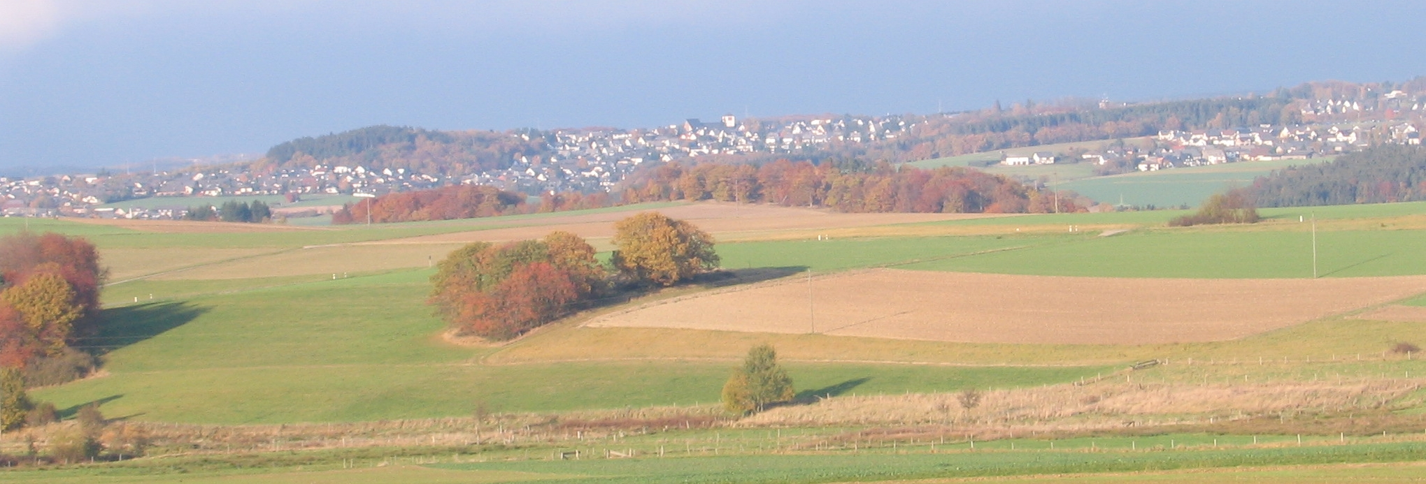 Emmelshausen im Hunsrück aus Richtung Westen